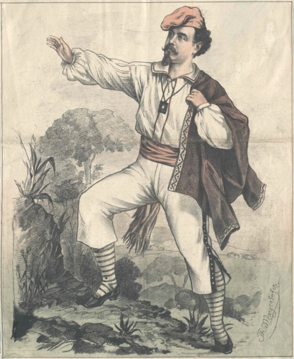 Julius Perotti (1841–1901) als "Masaniello" in "La muette de Portici"